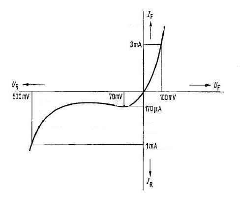 Backwarddiode